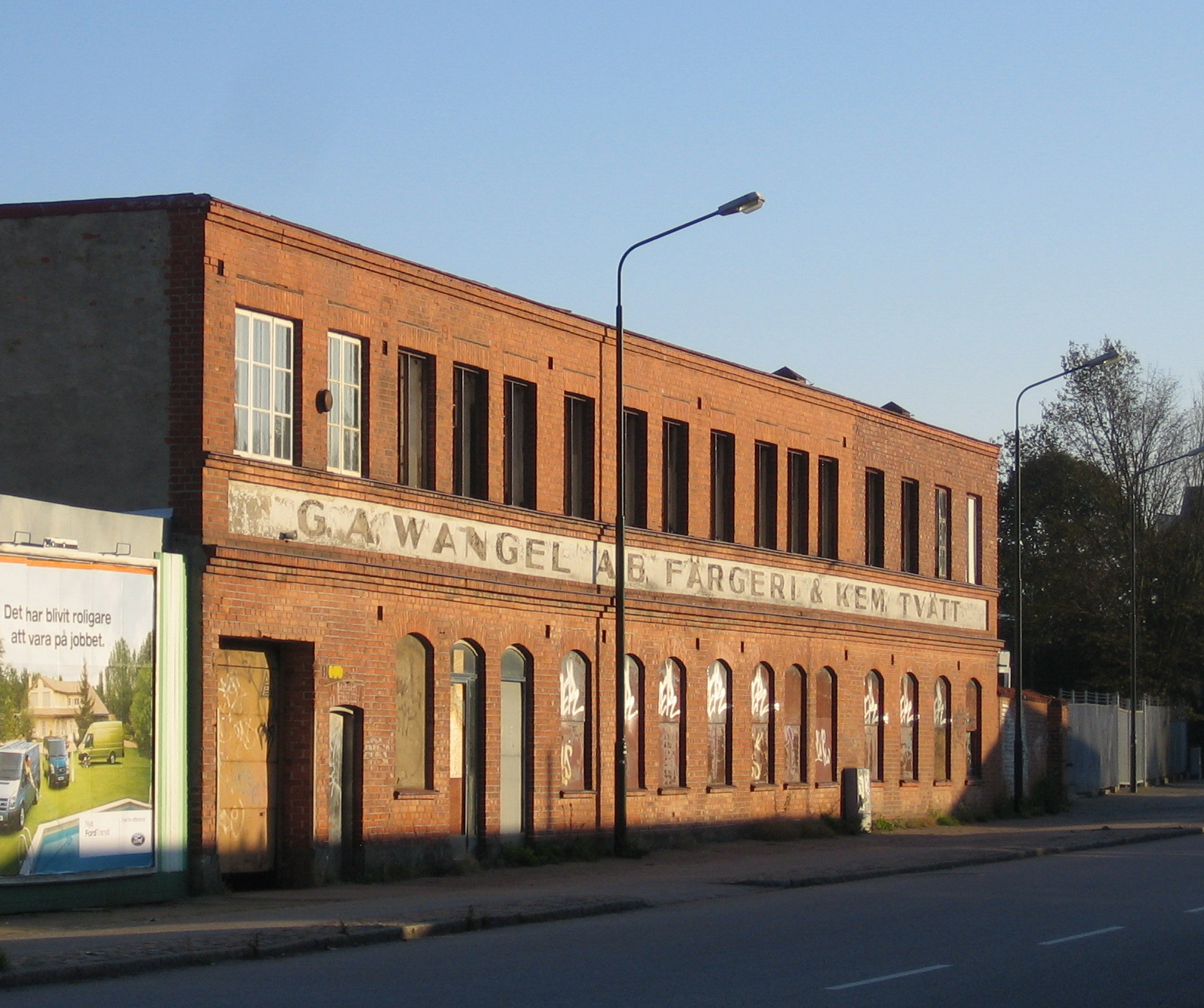 Sorgenfri industriområde, Malmö, Sweden